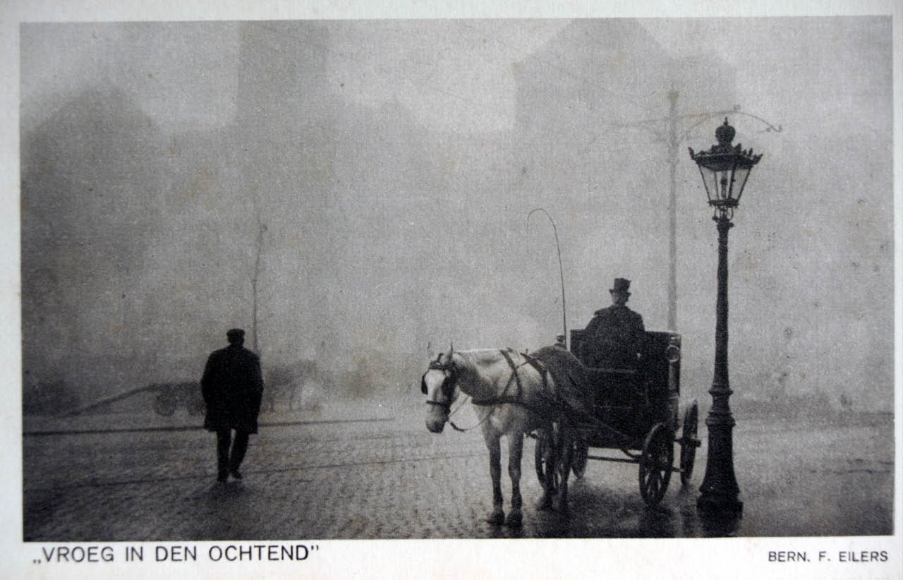 Damrak, De beurs in de ochtendnevel met een aapje